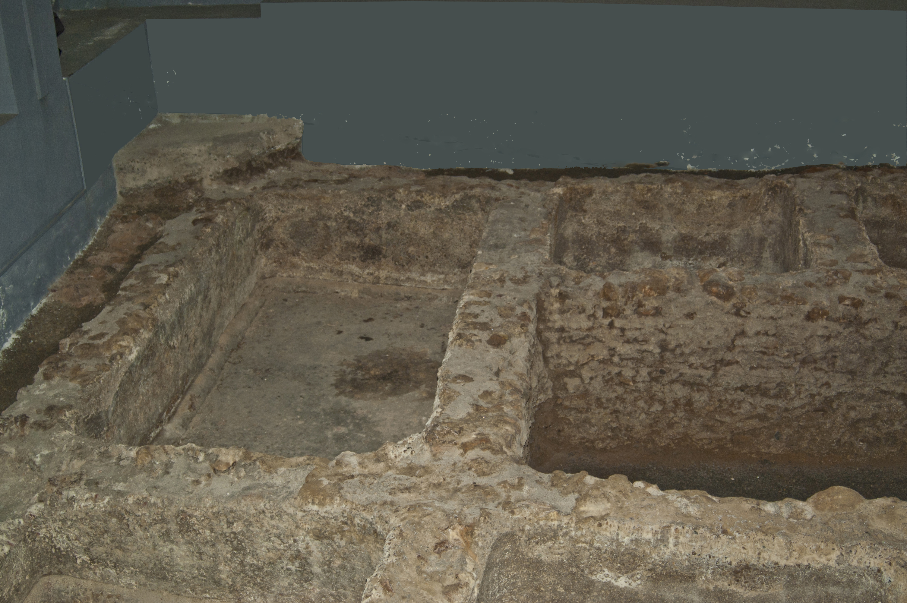 Enclave Arqueológico Puerta de Almería. Balsas romanas.